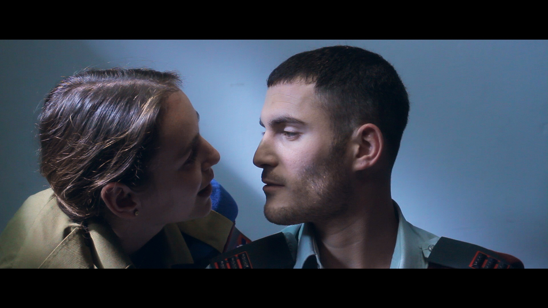 מתוך הסרט "חדר 514" בבימויו של שרון בר-זיו